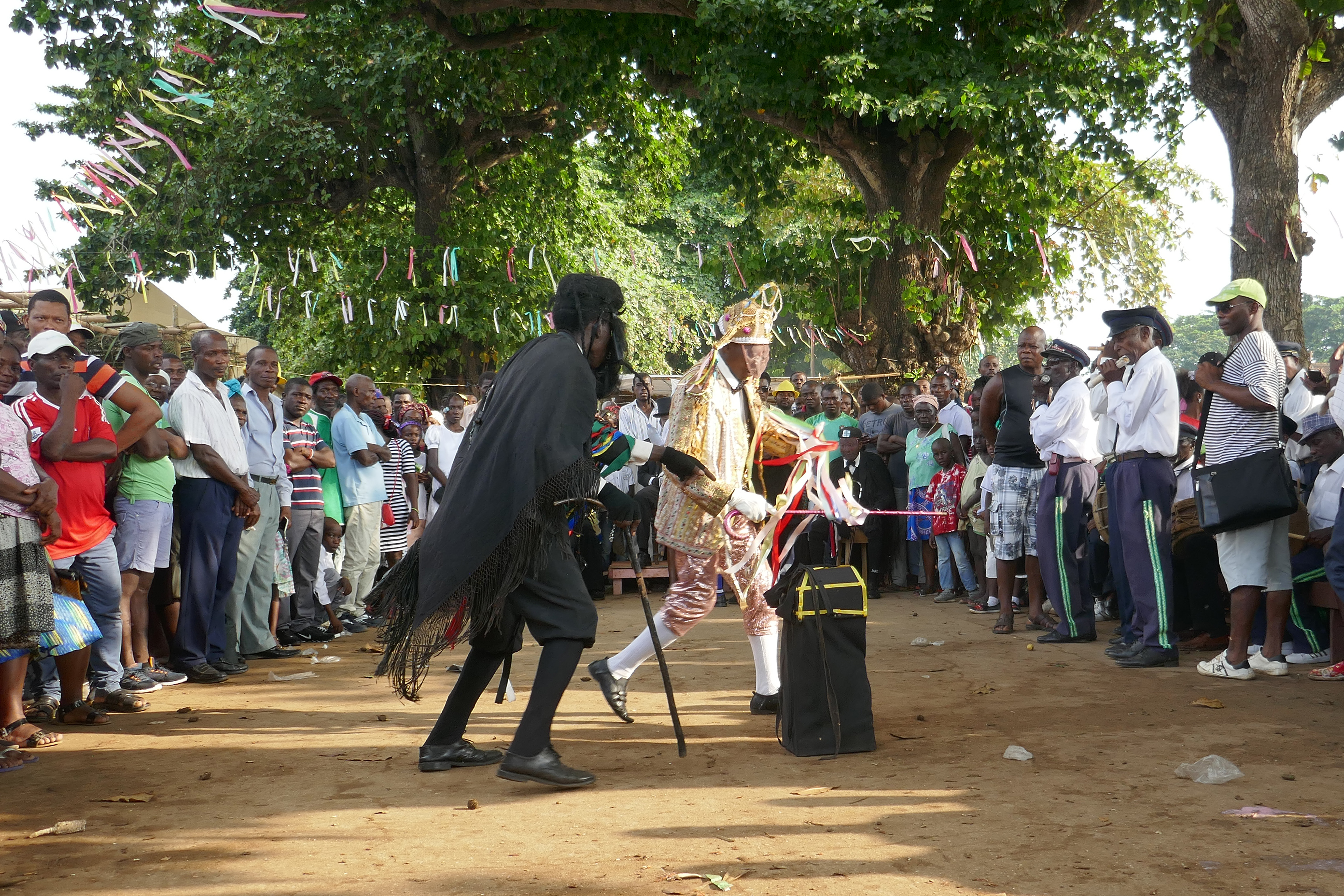 Tchiloli représenté devant l'église São Pedrão de São Tomé à l'occasion de la fête patronale. Le tchiloli est une forme théâtrale, musicale et dansée créée au XVIe siècle, jouée par des pêcheurs et des paysans. Traditionnellement elle met en scène la seule pièce du répertoire, La tragédie du marquis de Mantoue et de l'empereur Charlemagne". This is an image with the theme "Play" from: Sao Tome and Principe